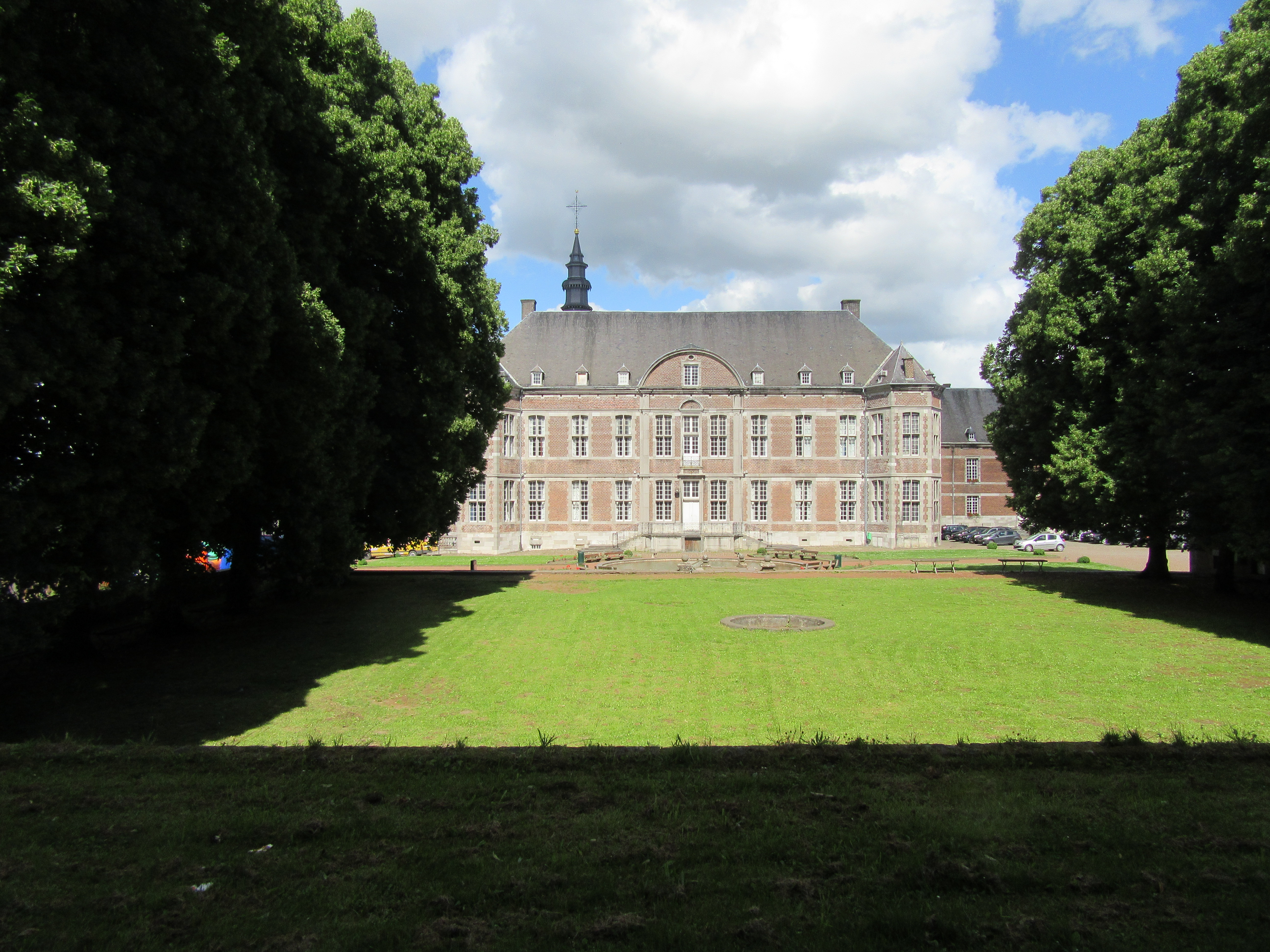 Construction classique à neuf travées devant le jardin à la française à l'abbaye de Floreffe